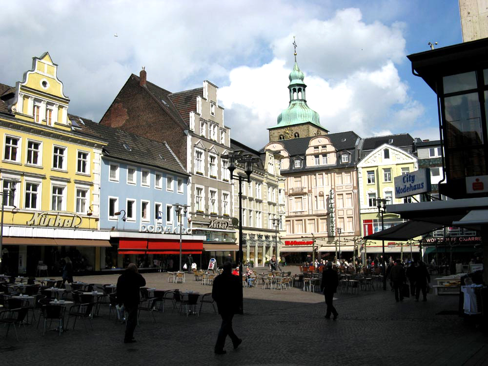 Marktplatz Recklinghausen